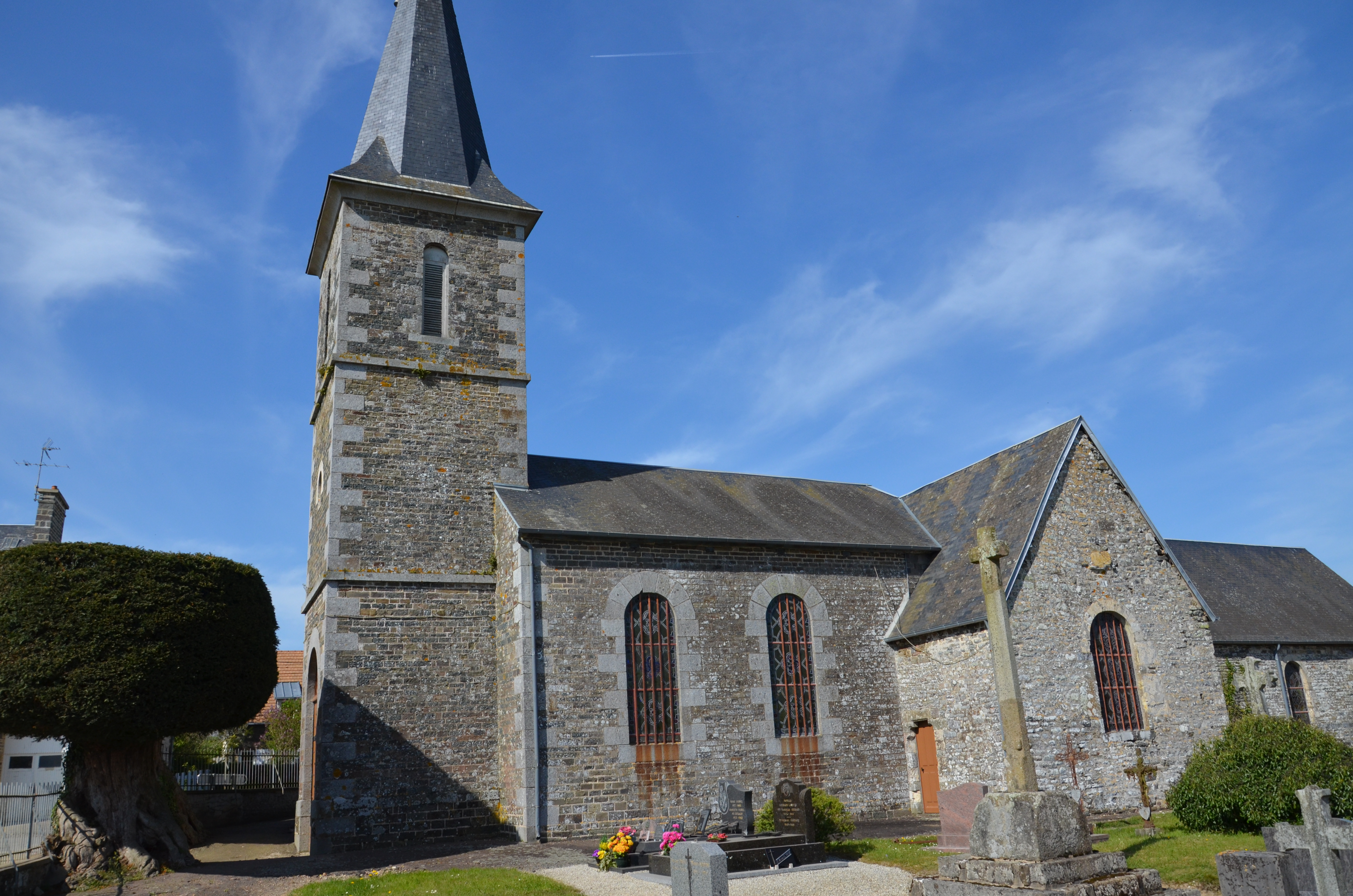 Église Saint-Denis de Saint-Denis-Maisoncelles.